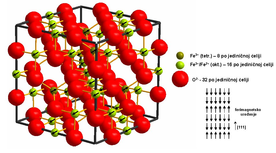 Struktura magnetita